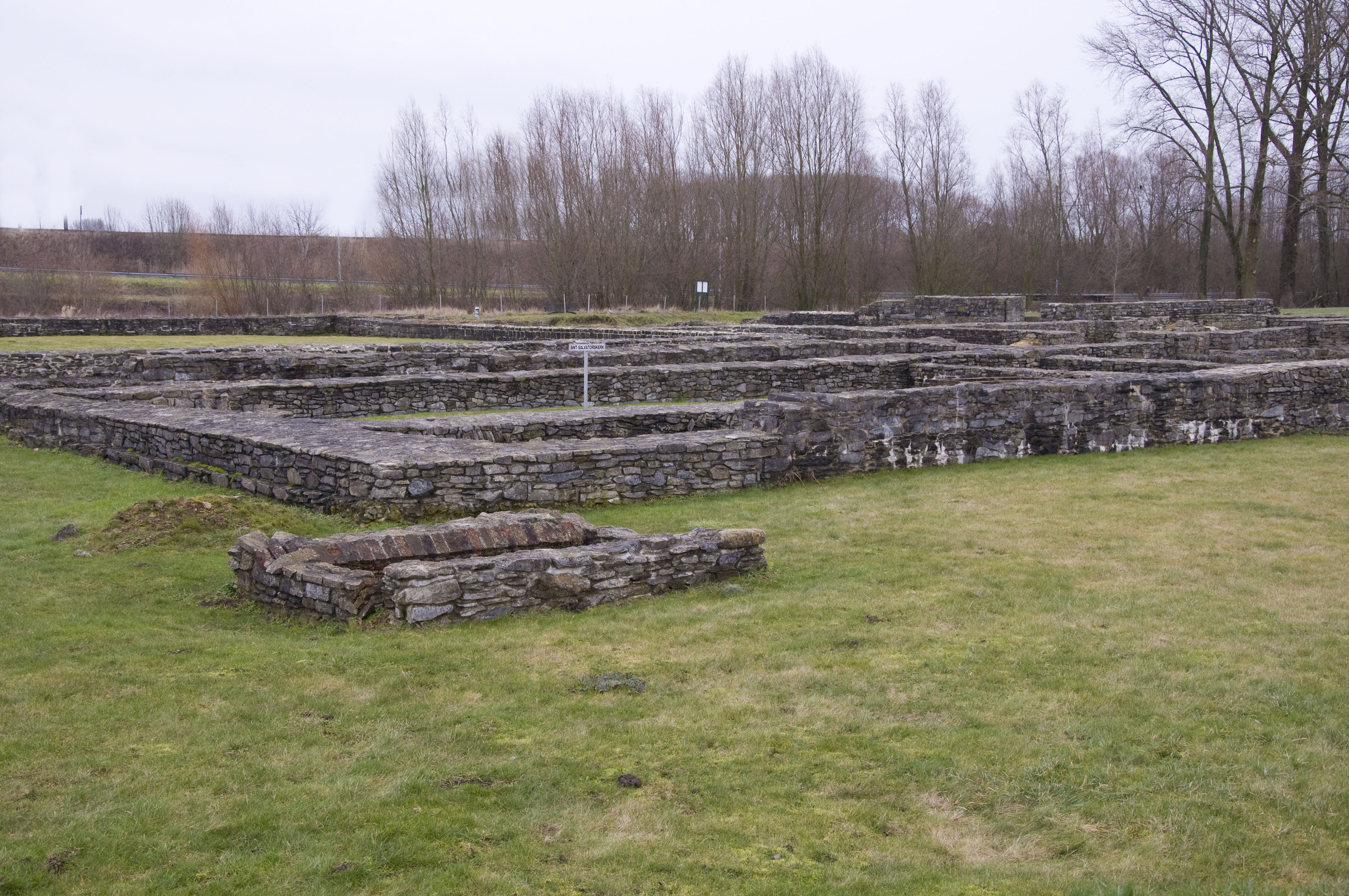 Archeologische site van Ename (België), 10e-11e eeuw, met zicht op de restanten van de Sint-Salvatorskerk